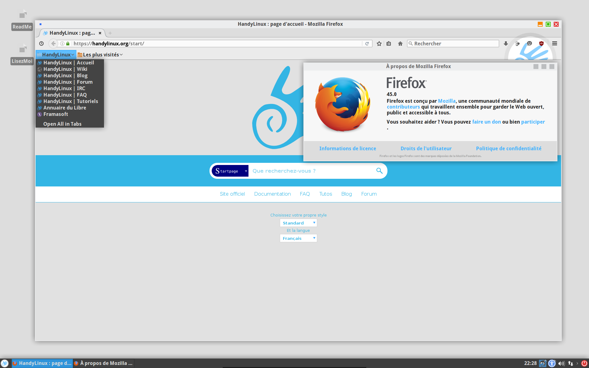 Page de démarrage HandyLinux